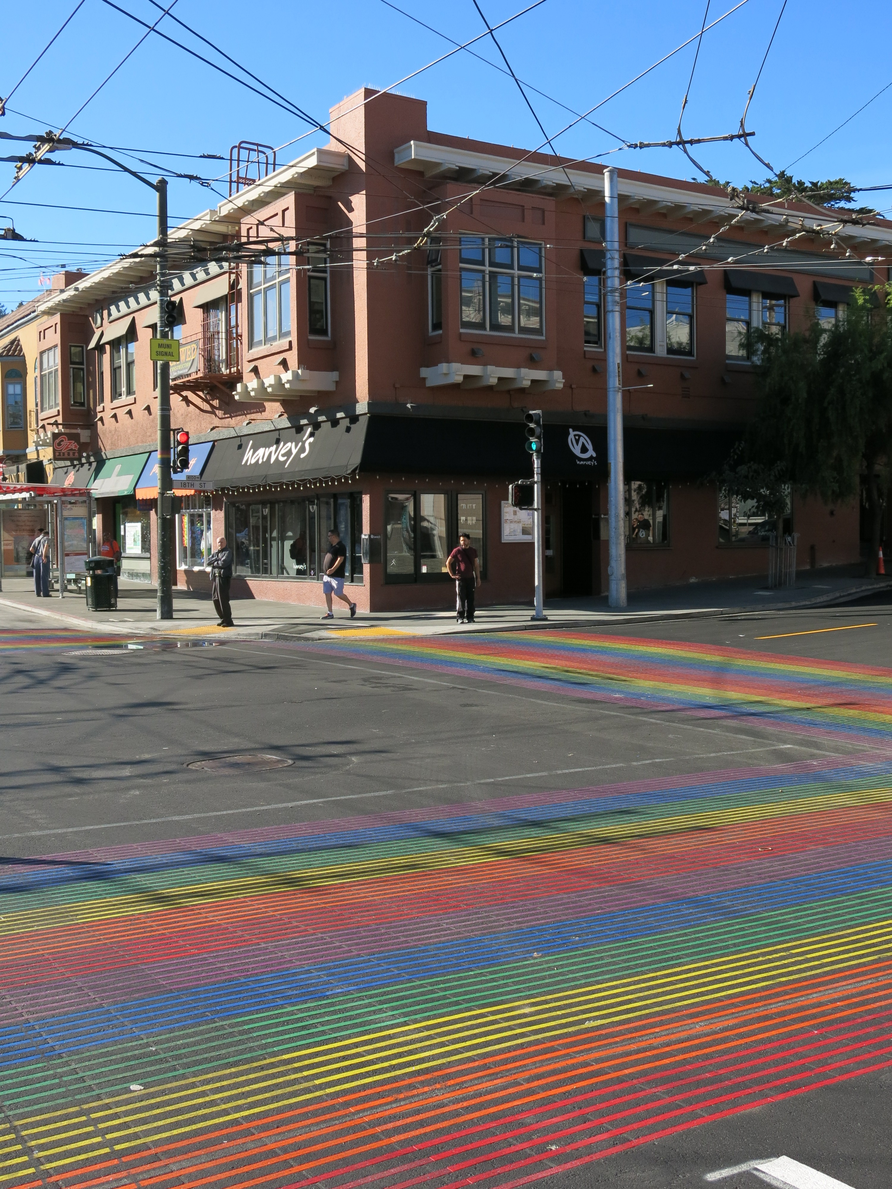 Ped Crossing in Rainbow Flag Colours at Corner Castro/18th